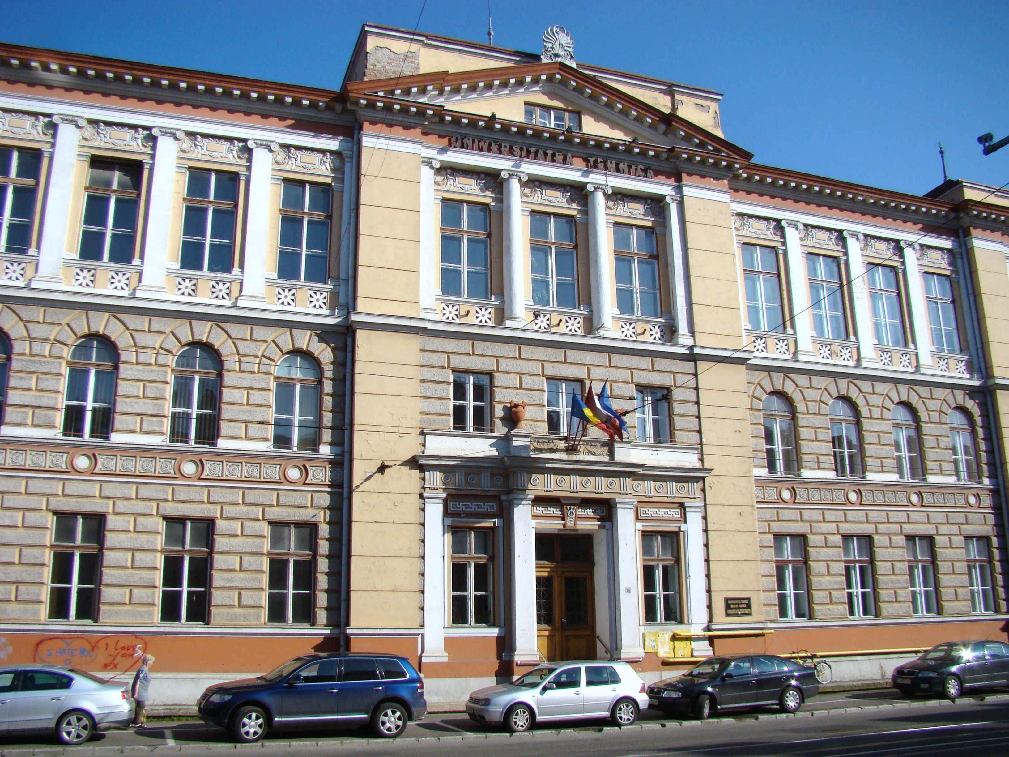 Clădire monument istoric, str. Barițiu, nr.25 (în prezent Institutul Politehnic)